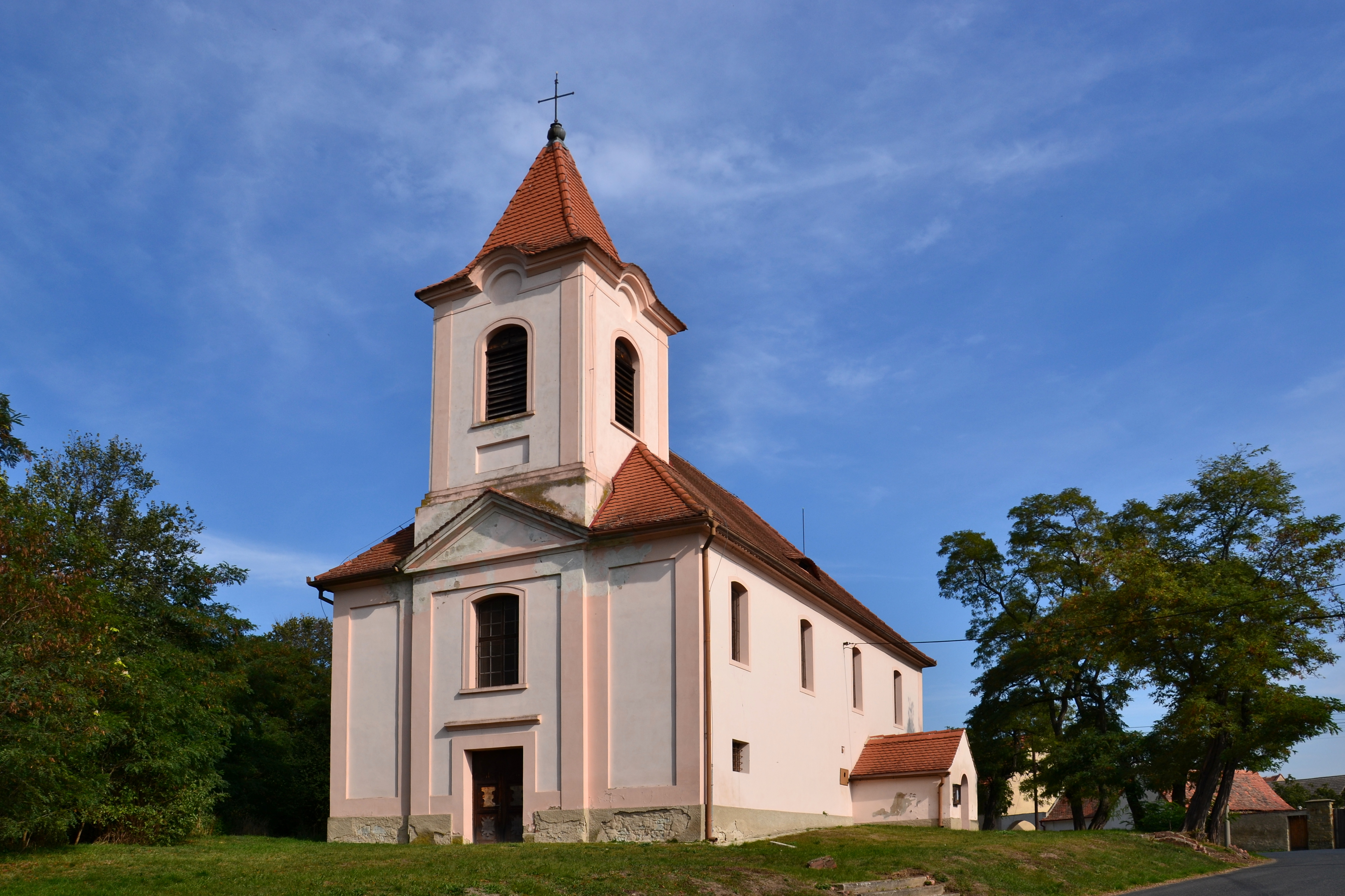 Kostel svatých Šimona a Judy, uprostřed obce, Hradiště (Postoloprty).